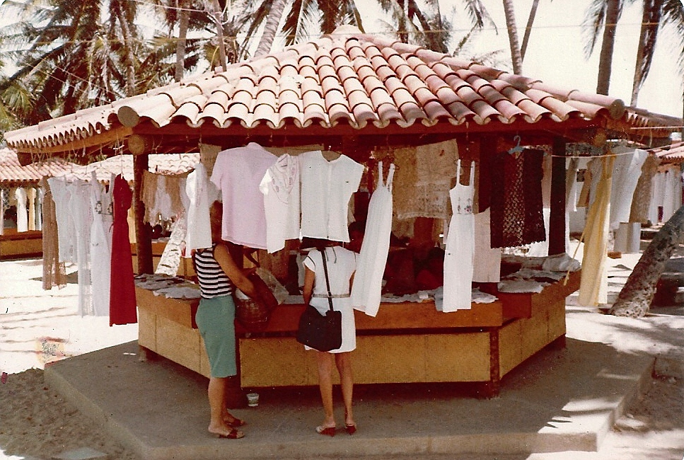 Banca de artesanato na vila da Prainha, Ceará.